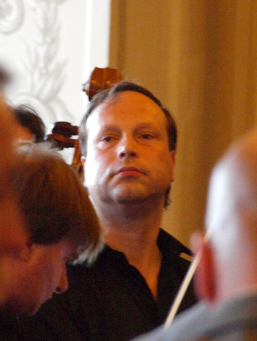 Lobkovický palác na Pražském hradě, dirigent Ondřej Macek